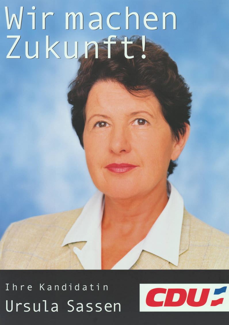 Wir machen Zukunft! Ihre Kandidatin Ursula Sassen CDUAbbildung:PorträtfotoPlakatart:Kandidaten-/Personenplakat mit PorträtObjekt-Signatur:10-012 : 1207Bestand:Landtagswahlplakate Schleswig-Holstein (10-012)GliederungBestand10-18:Landtagswahlplakate Schleswig-Holstein (10-012) » CDULizenz:KAS/ACDP 10-012 : 1207 CC-BY-SA 3.0 DE